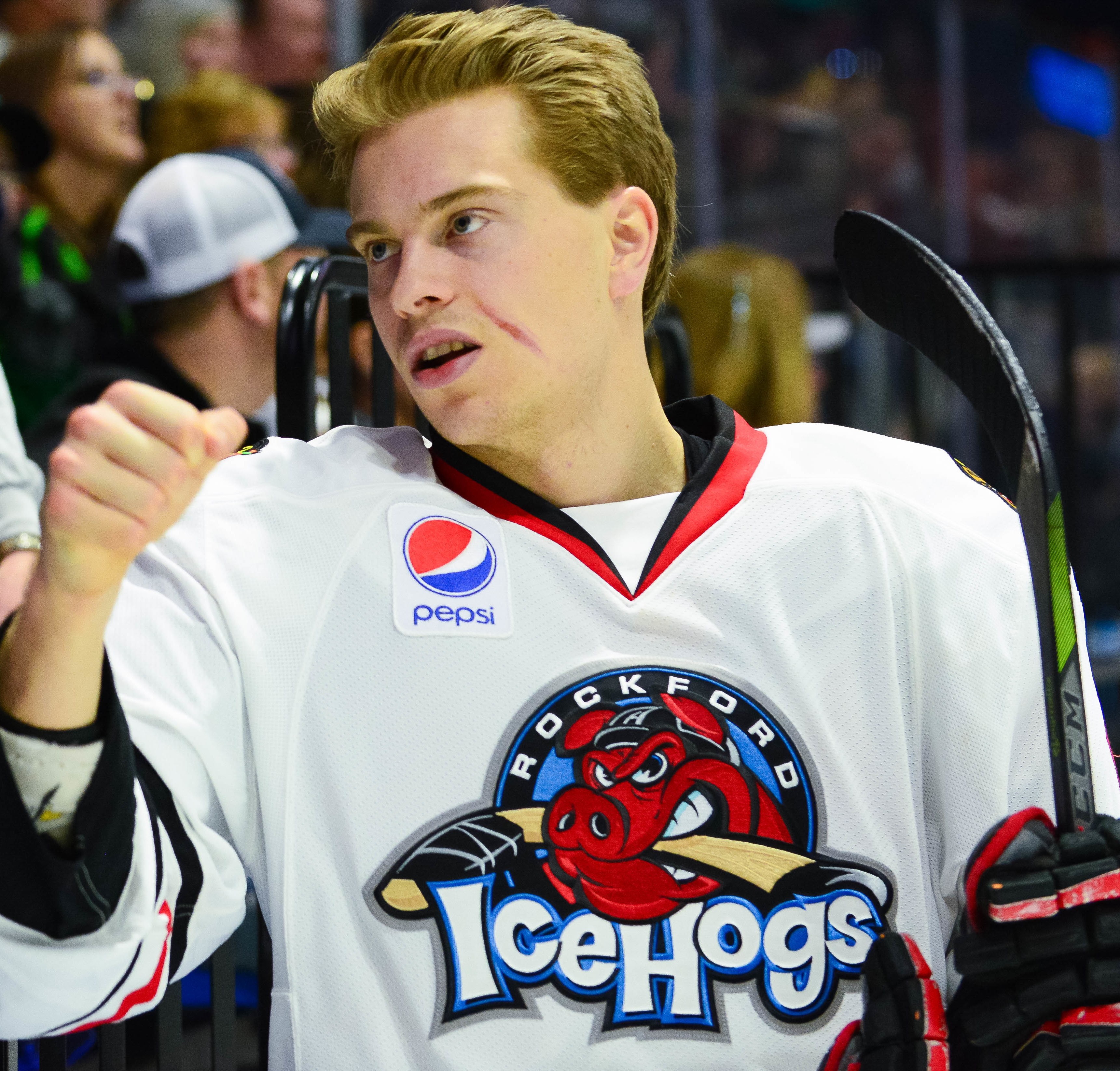 (Bryan Peck/ AHL)